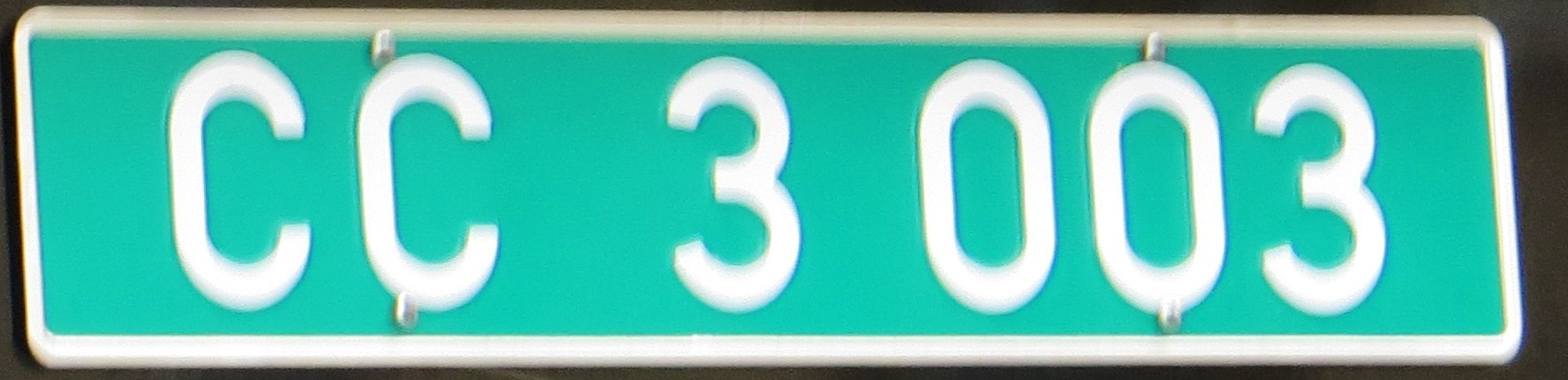 Consulaire kentekenplaat Spanje